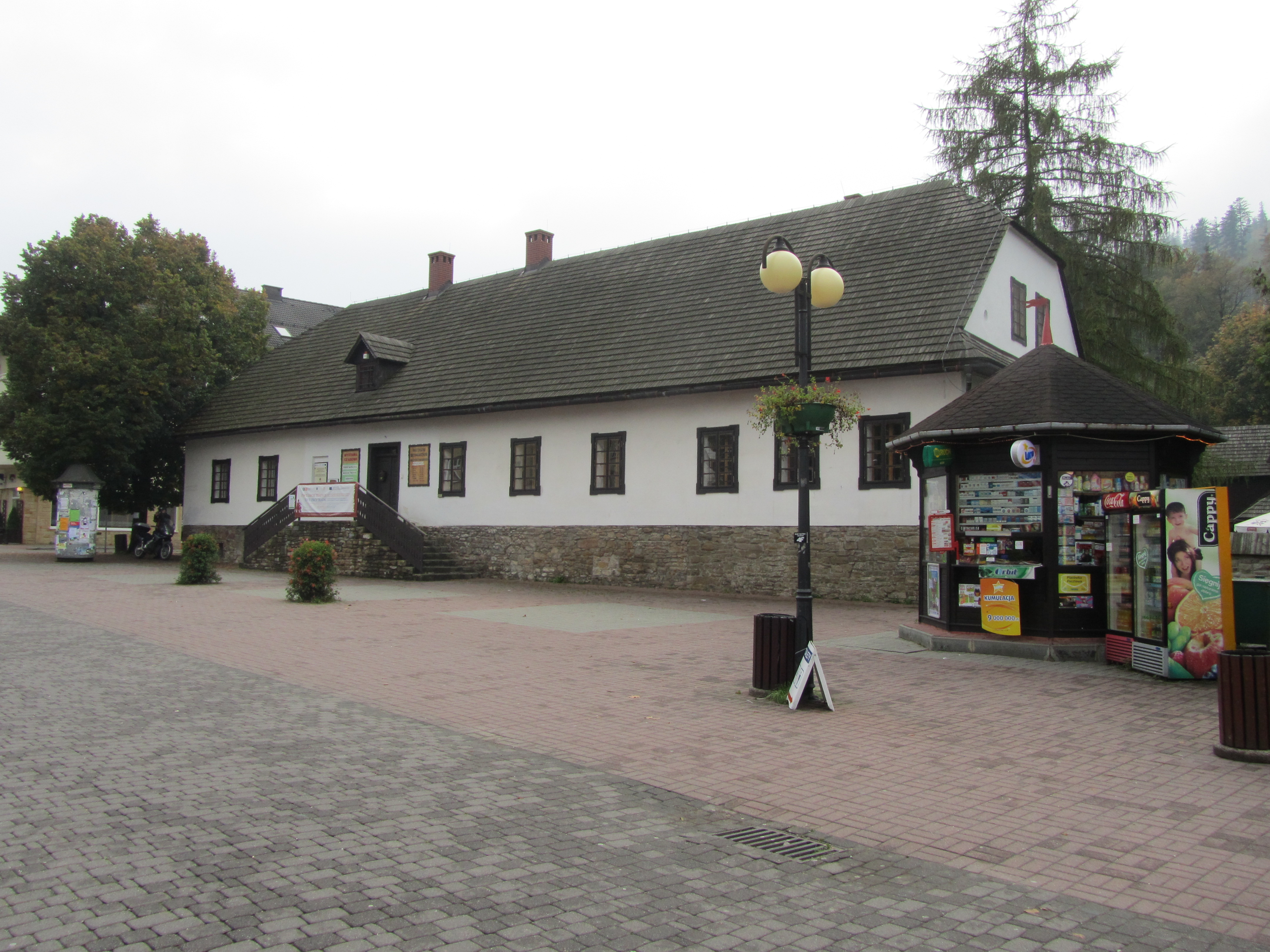 ZABYTKOWY DOM.